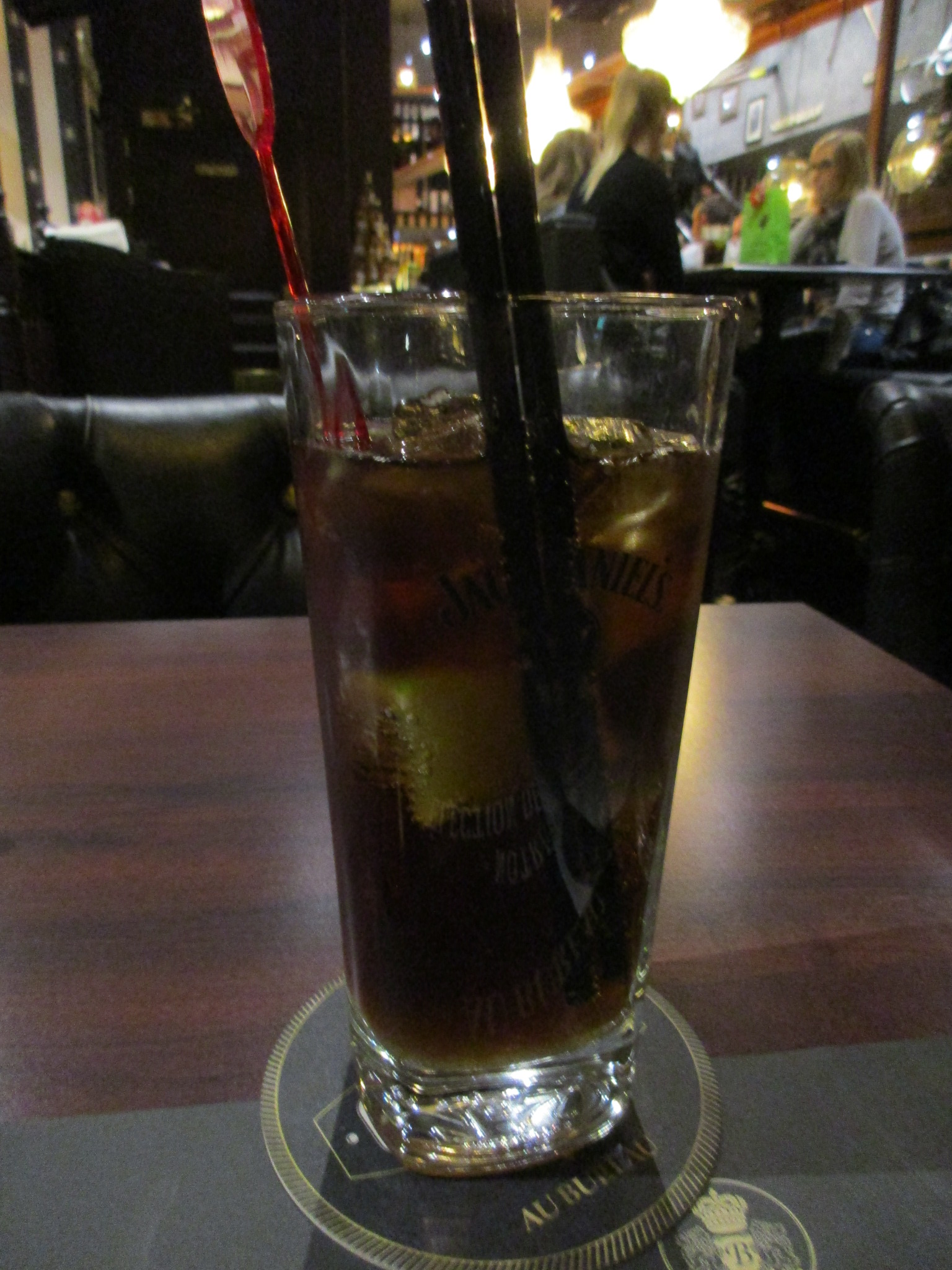 Cuba libre